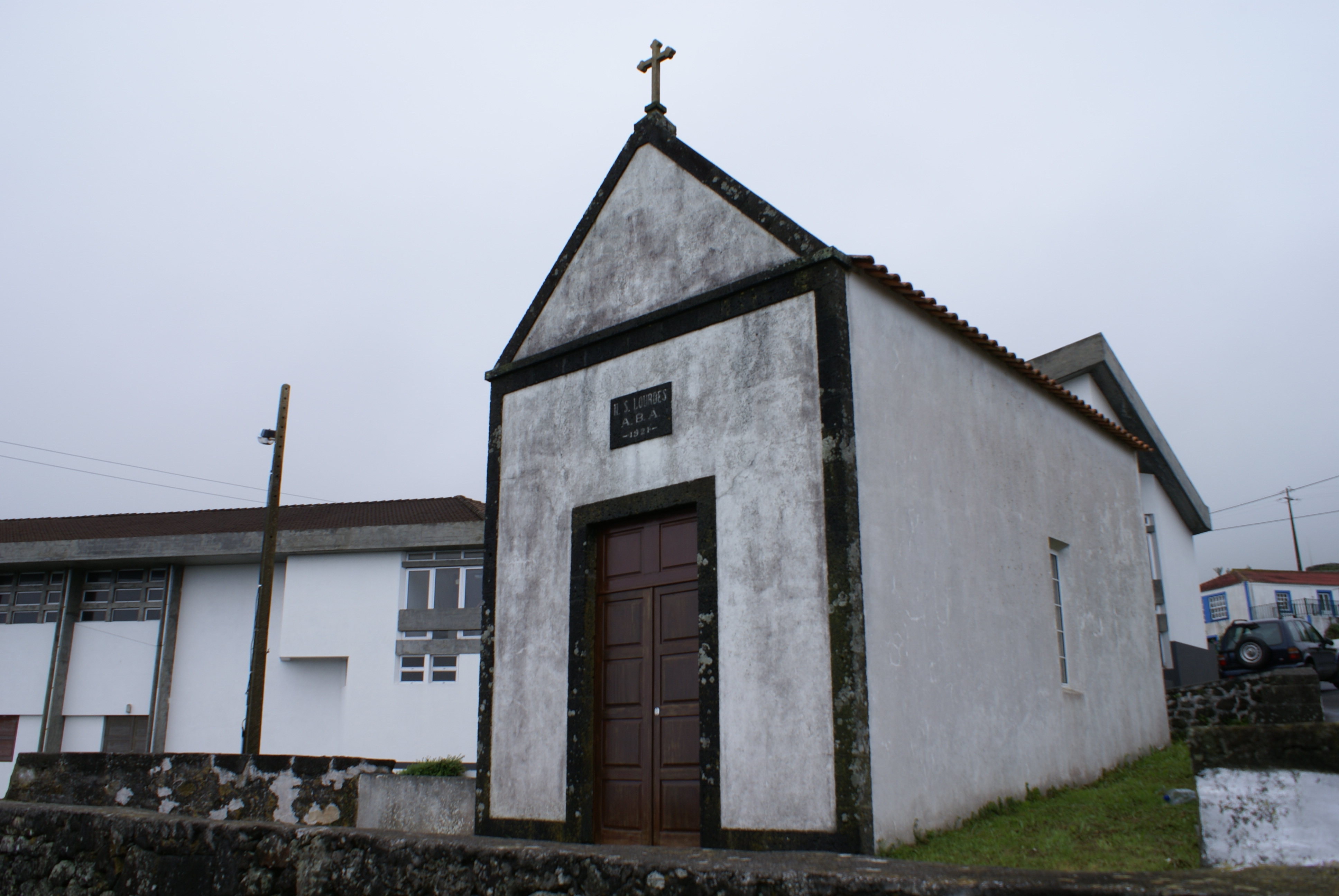 Ermida de Nossa Senhora de Lurdes, Beira, Velas, ilha de São Jorge